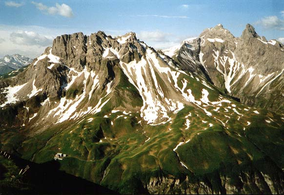 Beschreibung: Blick zur Kemptener Hütte am Fuße des Kratzers und rechts die Mädelegabel Quelle: selbst fotografiert am 8. Juli 2004 Fotograf: Hejkal